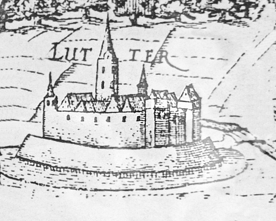 Burg Lutter. 1626 auf der Darstellung eines zeitgenössischen Kupferstichs zur Schlacht bei Lutter